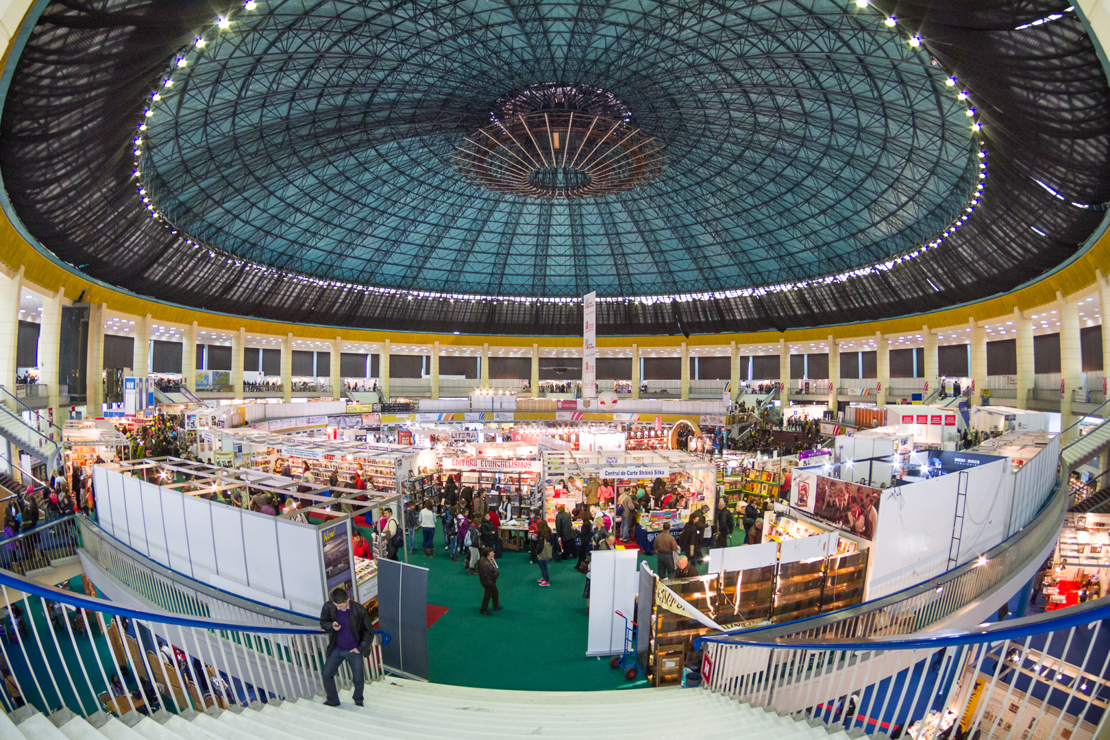 Interior - Romexpo, Bucuresti